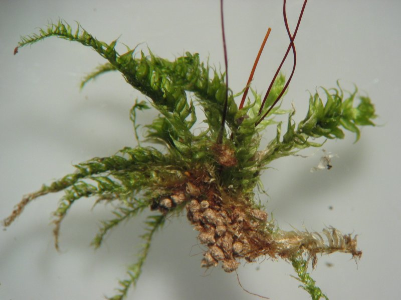 Schlesisches Stumpenmoos (Sharpiella seligeri / Herzogiella seligeri), Habitus, ganze Pflanze